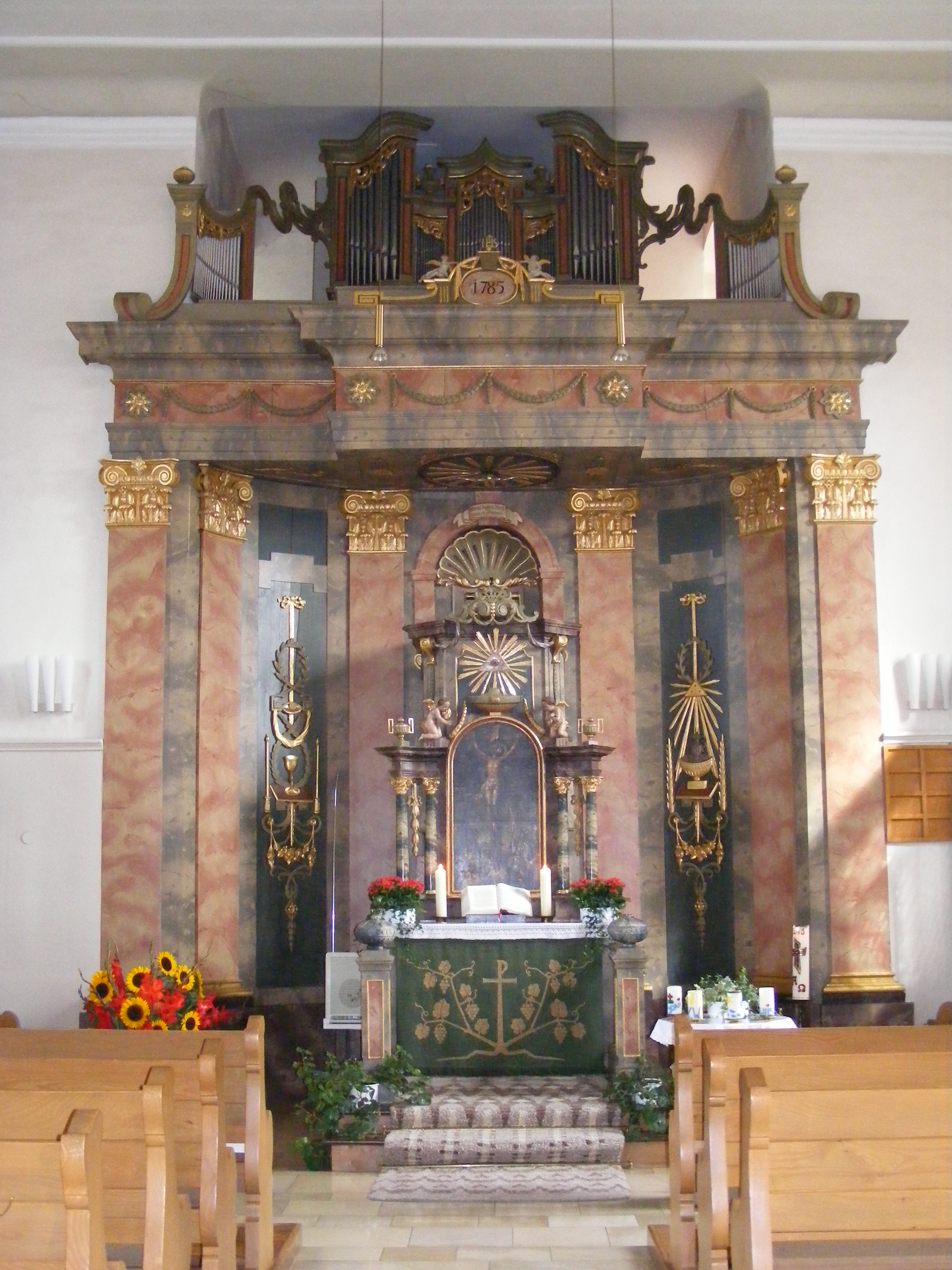 Kanzelwand der Kirche Ettenhausen,erbaut 1785 im Markgrafenstil